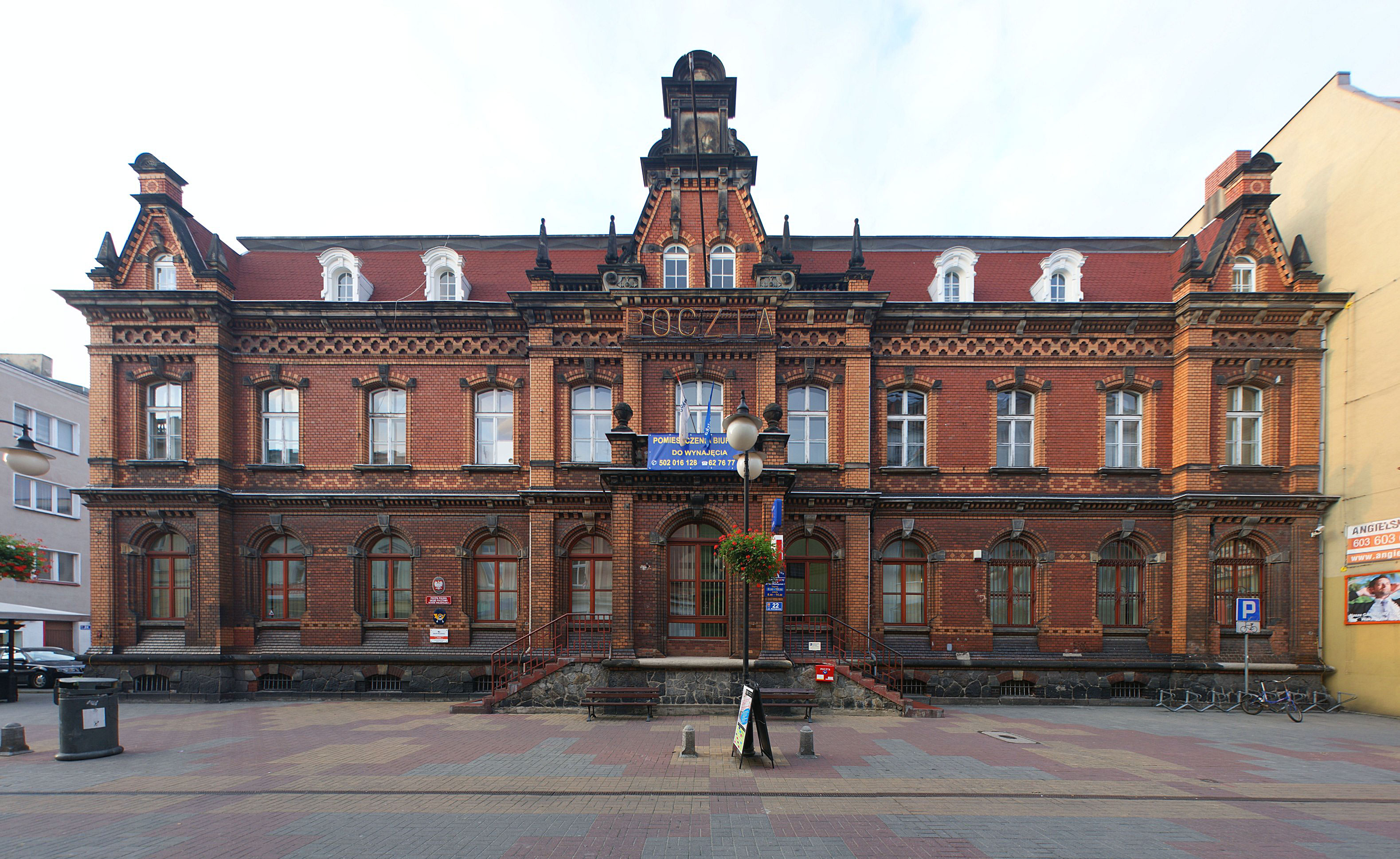 Ostrów Wielkopolski, ul. Kolejowa 22 - budynek poczty z 1886 r. (zabytek nr 846/Wlkp/A)